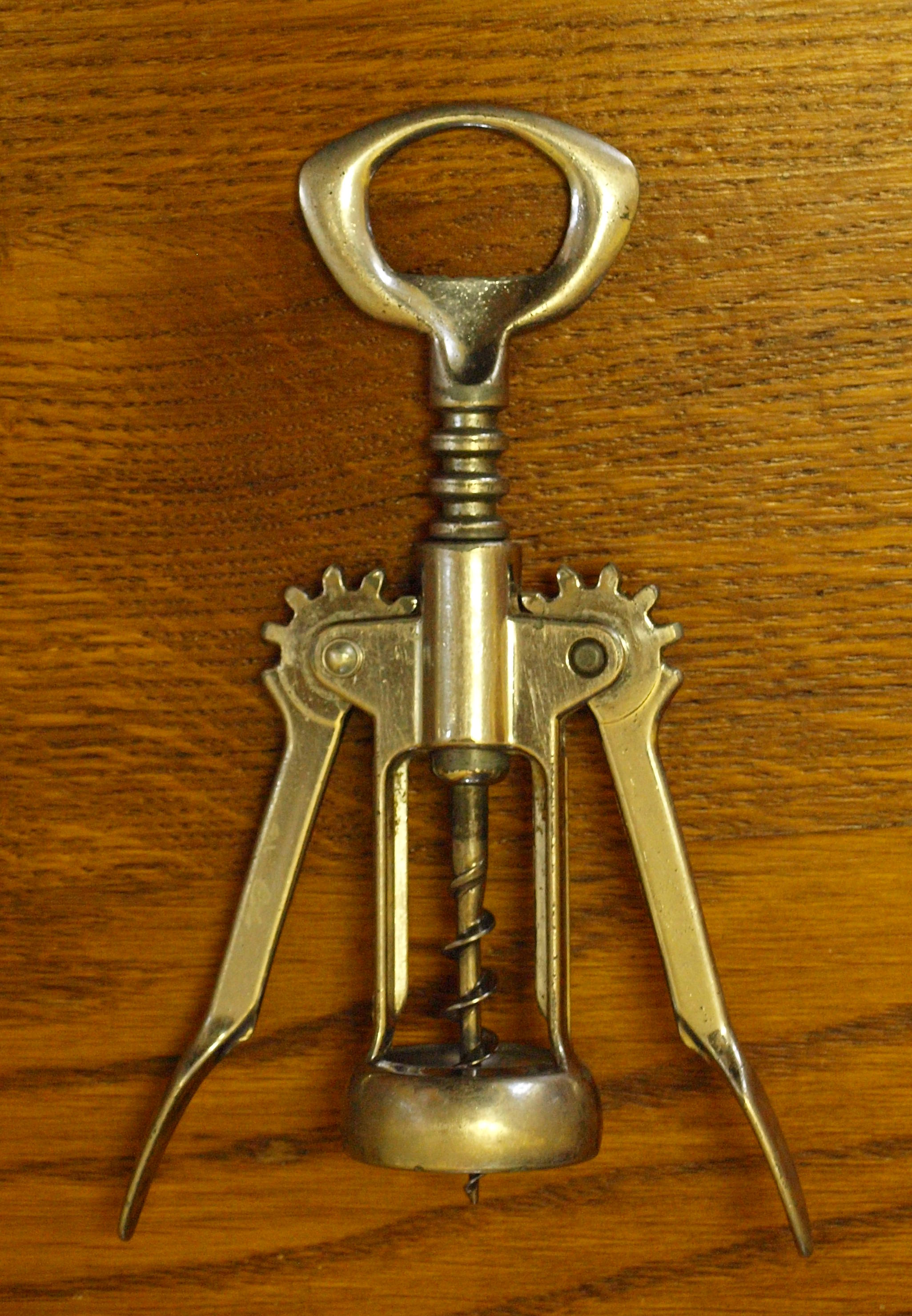 Tire-bouchon à levier, familièrement nommé "gendarme".